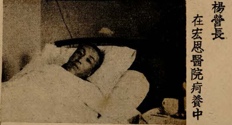 八百壯士營長楊瑞符